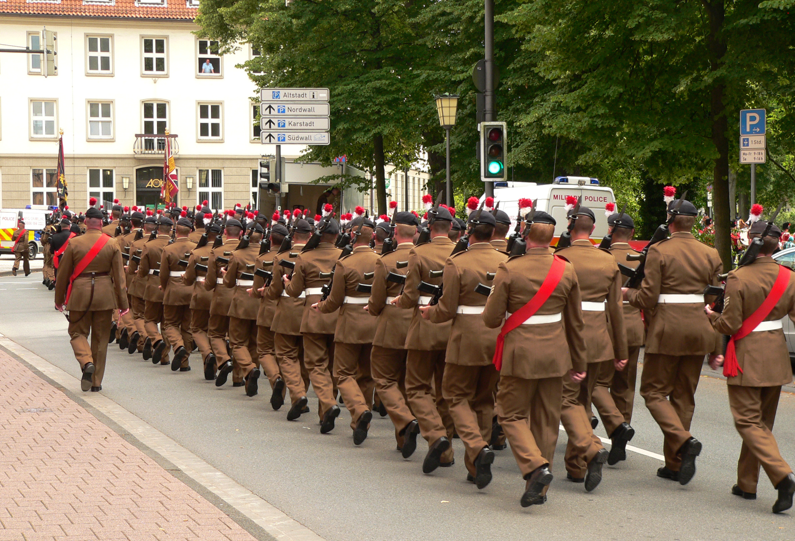 Letzter Mrsch des Royal Regiment of Fusiliers durch Celle